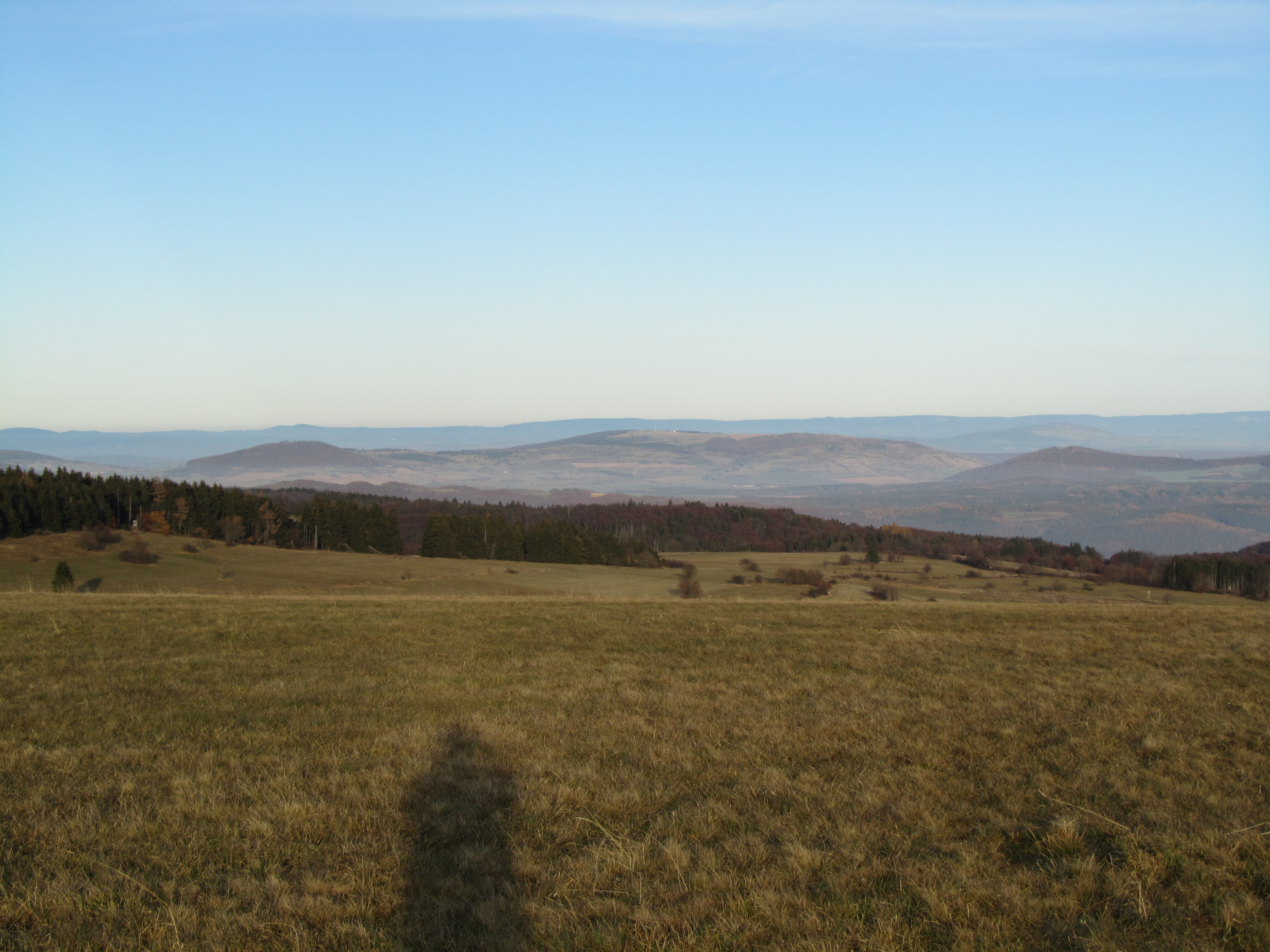 Blick vom Melpertser Rasenberg (862 m) in der Rhön nach Nordosten. In der Bildmitte die Hohe Geba. Im Hintergrund der Thüringer Wald.